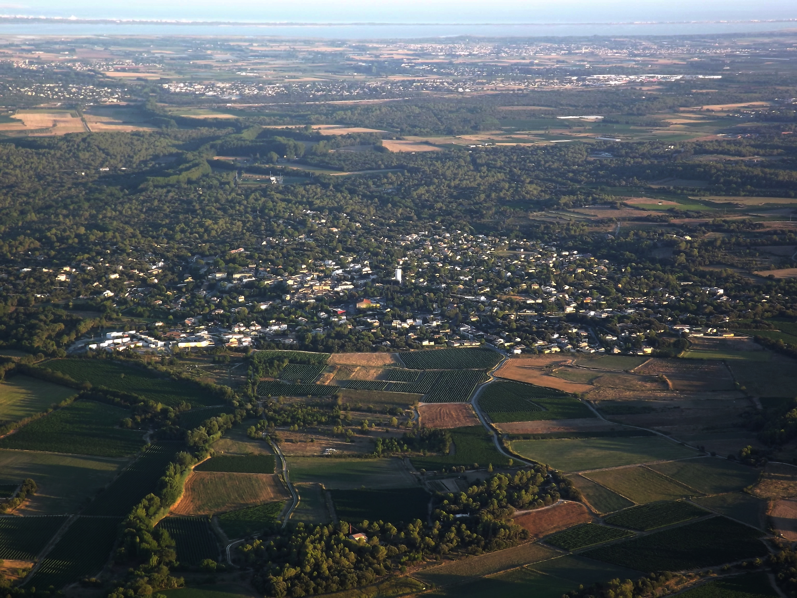 Vue Aérienne de Sussargues